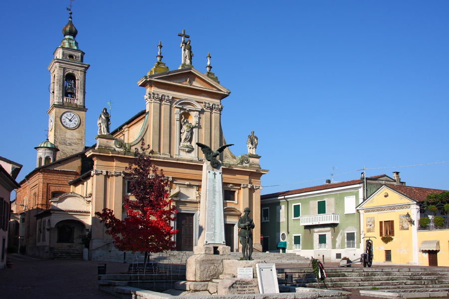 Veduta della piazza di Gravellona Lomellina (PV) con la Chiesa Parrocchiale della Beata Vergine Assunta ed il monumento ai caduti